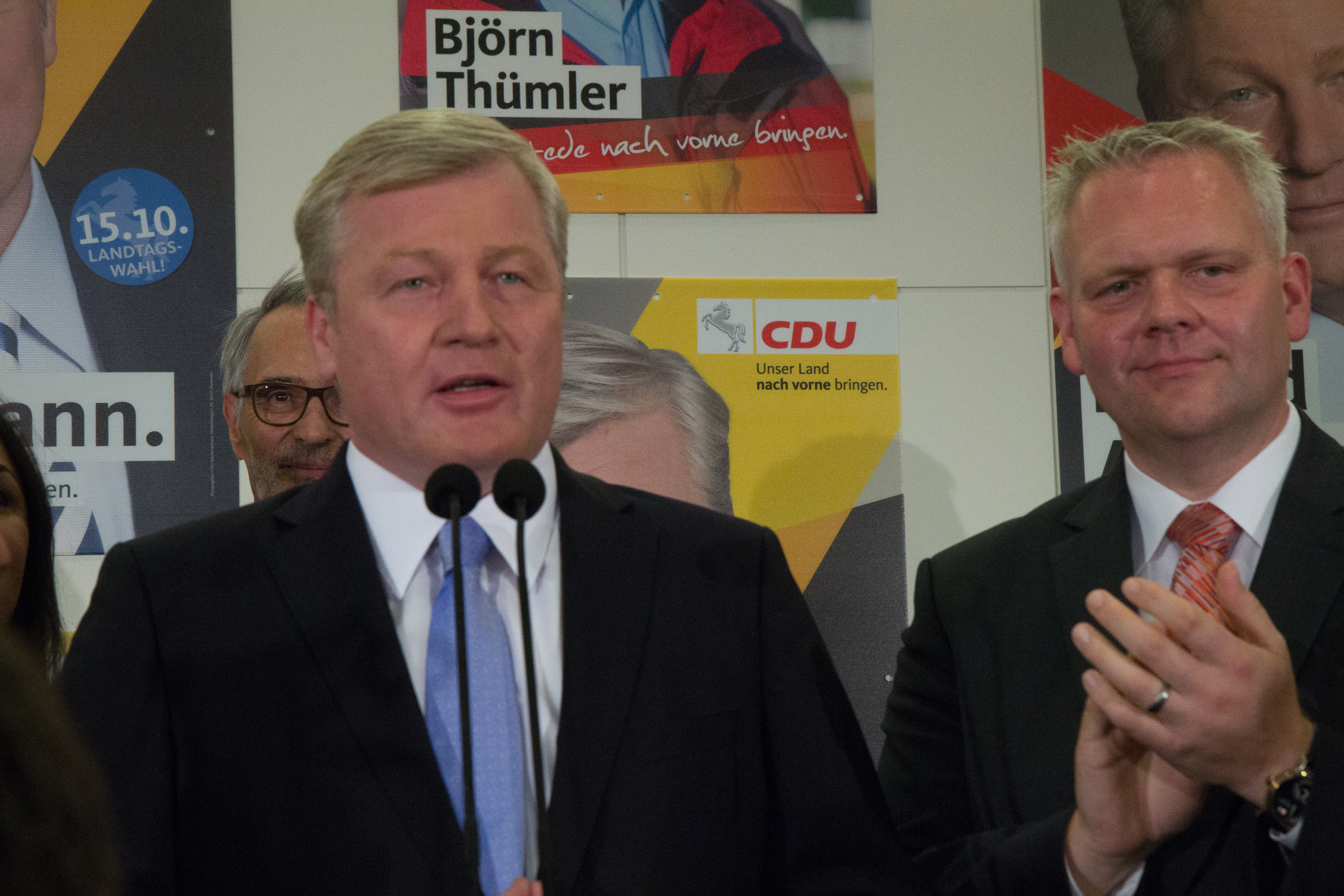 Niedersächsische Landtagswahl am 15. Oktober 2017: Wahlabend in der CDU Landtagsfraktion